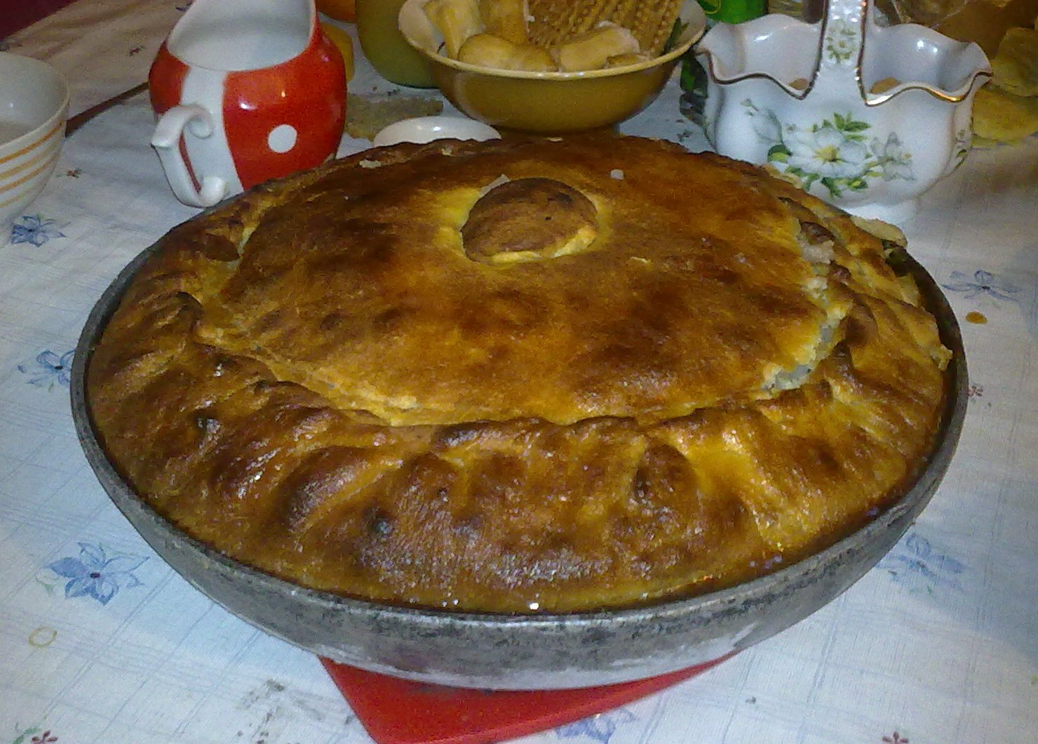 Татарча/tatarça: Авылда пешергән Зур бәлеш.